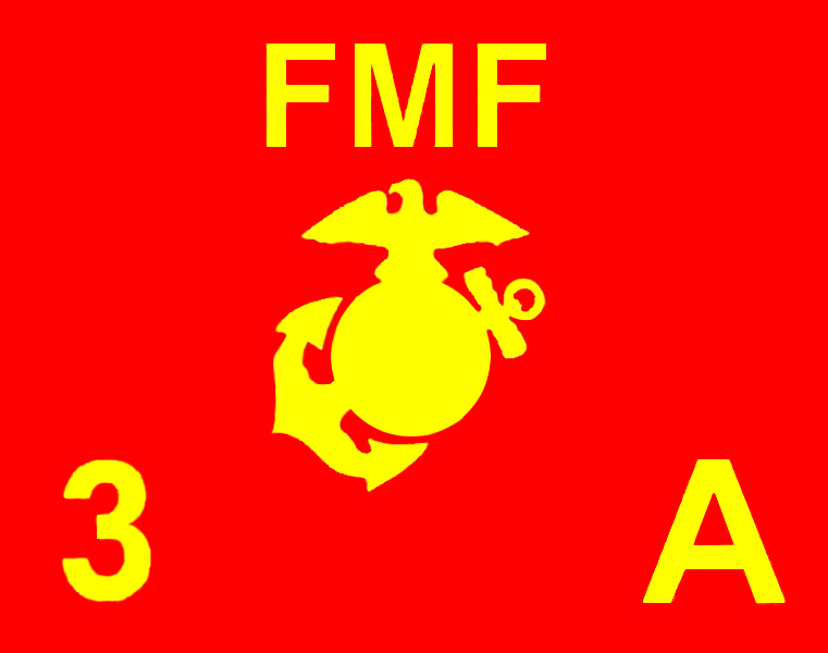 USMC guidon